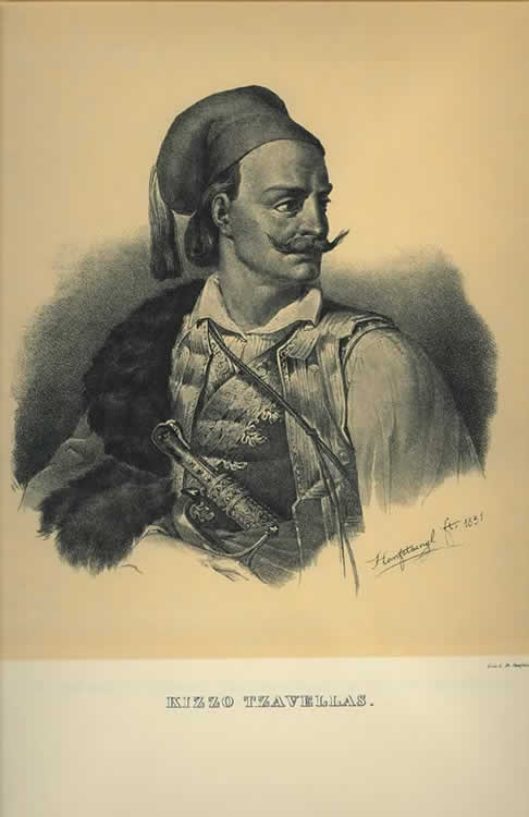 Aπό: Bildnisse ausgezeichneter Griechen und Philhellenen nebst einigen Ansichten und Trachten. Nach der Natur gezeichnet und herausgegeben von Karl Krazeisen. Munchen 1831